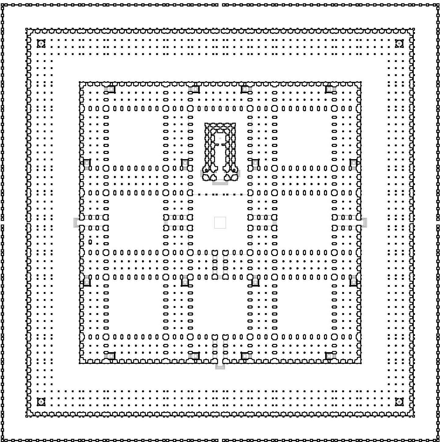 Planta de la reconstrucción del Templo de Ezequiel, de Juan Bautista Villalpando (Roma, 1605)